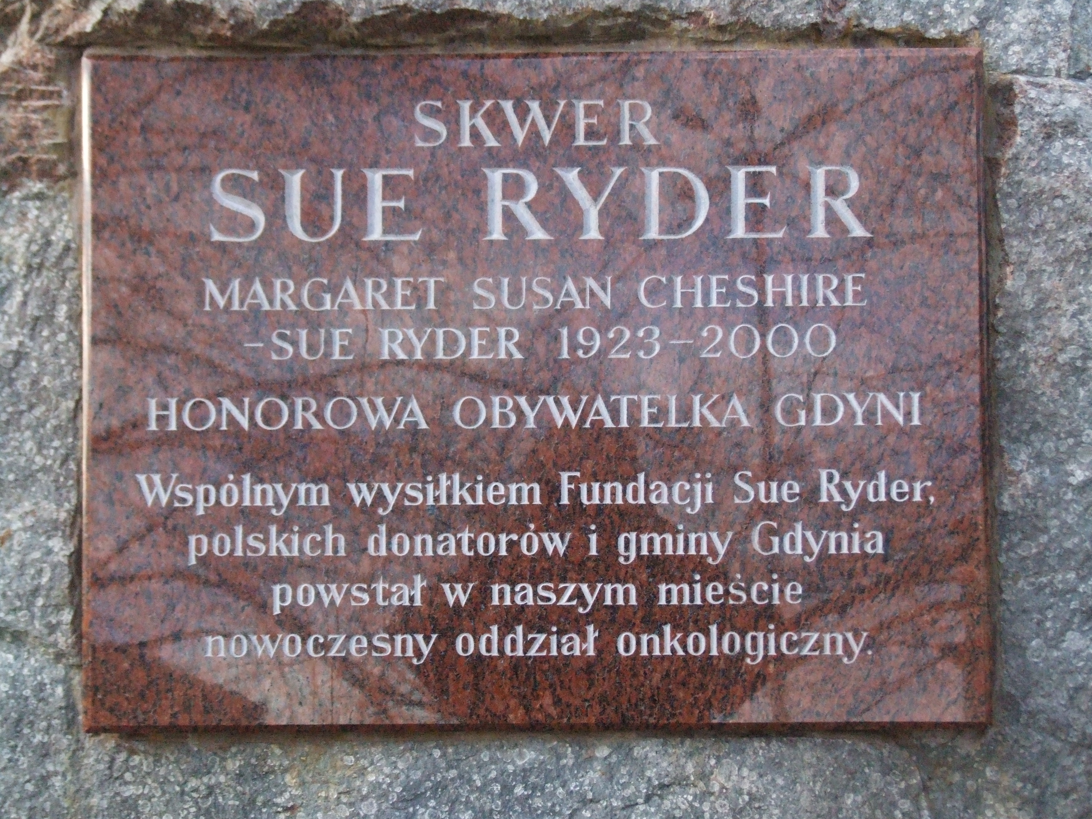 Obelisk na skwerze Sue Ryder - Gdynia